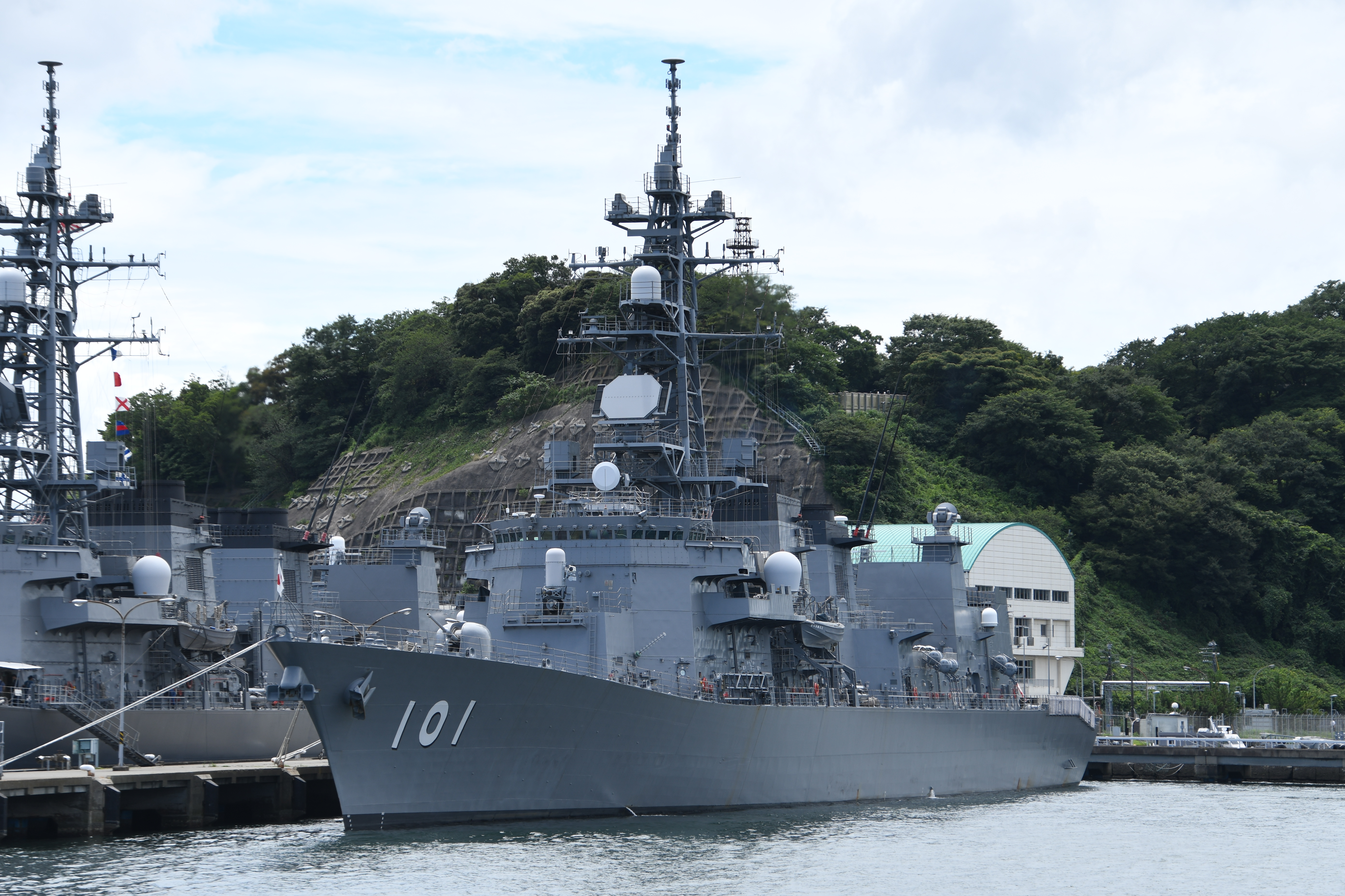 海上自衛隊 護衛艦むらさめ（DD-101） 左舷前面。2019年7月26日 横須賀基地にて。